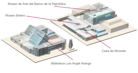 Esquema del complejo cultural del Banco de la República del cual es parte la Biblioteca Luis Ángel Arango, en Bogotá. Creado por en abril de 2006